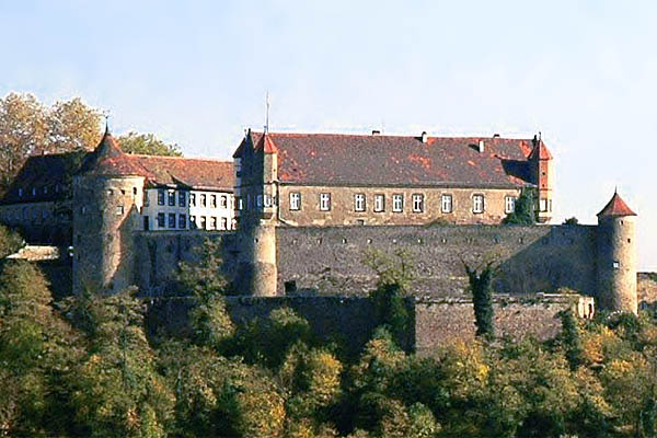 Burg Stettenfels bei Untergruppenbach